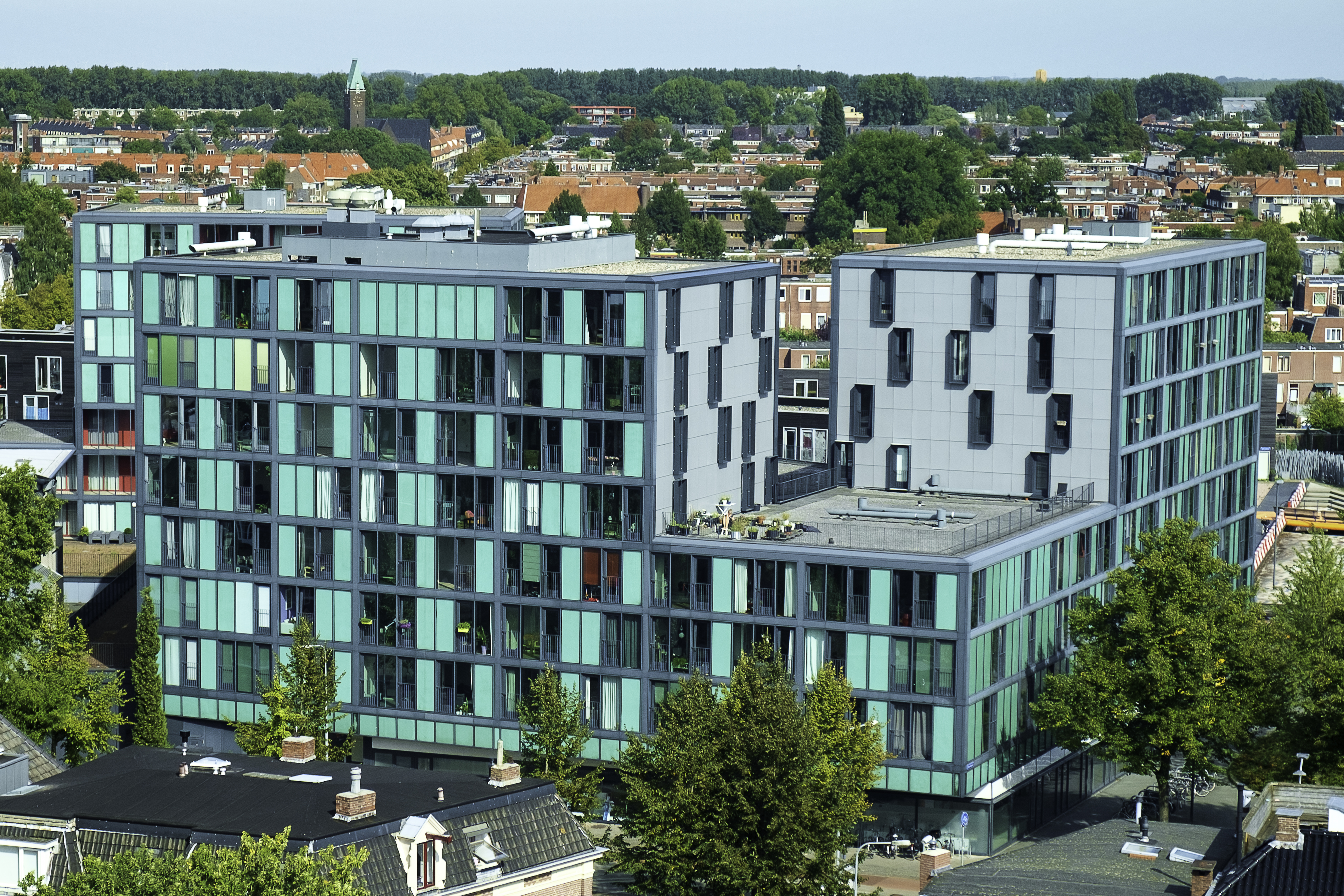 Winkelcentrum De Beren vanaf de watertoren aan de Noorderbinnensingel